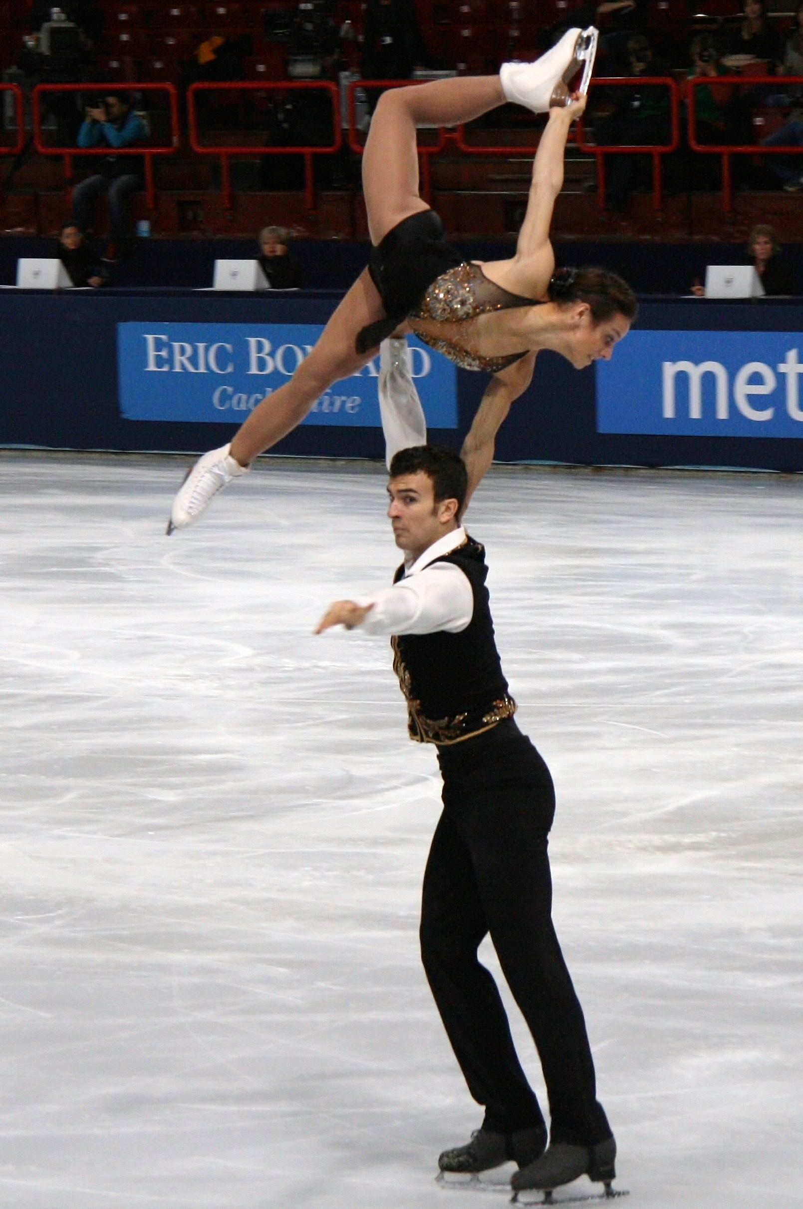 Мэган Дюамель и Эрик Рэдфорд на 2011 Trophée Eric Bompard